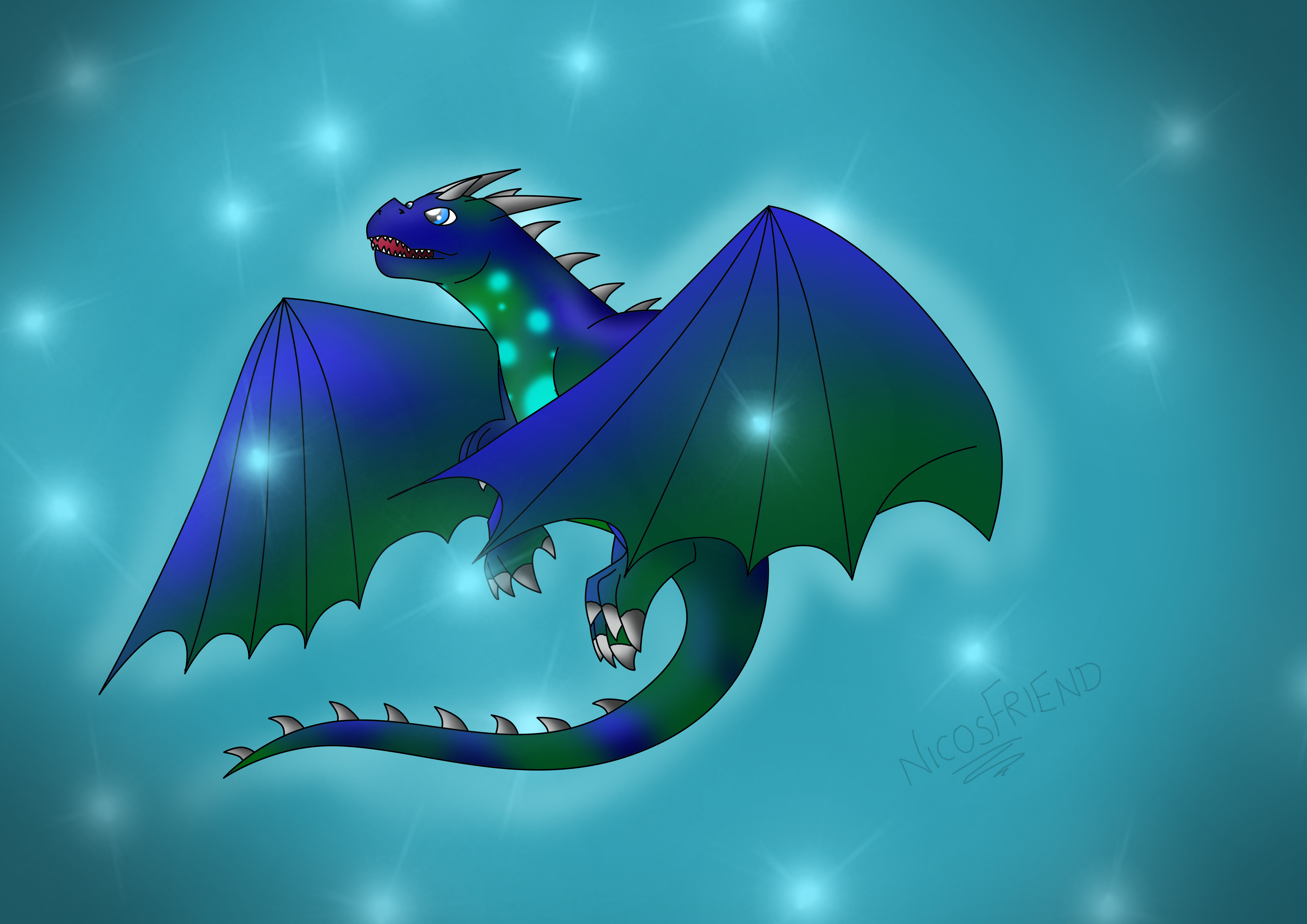 Mia Tinderflame